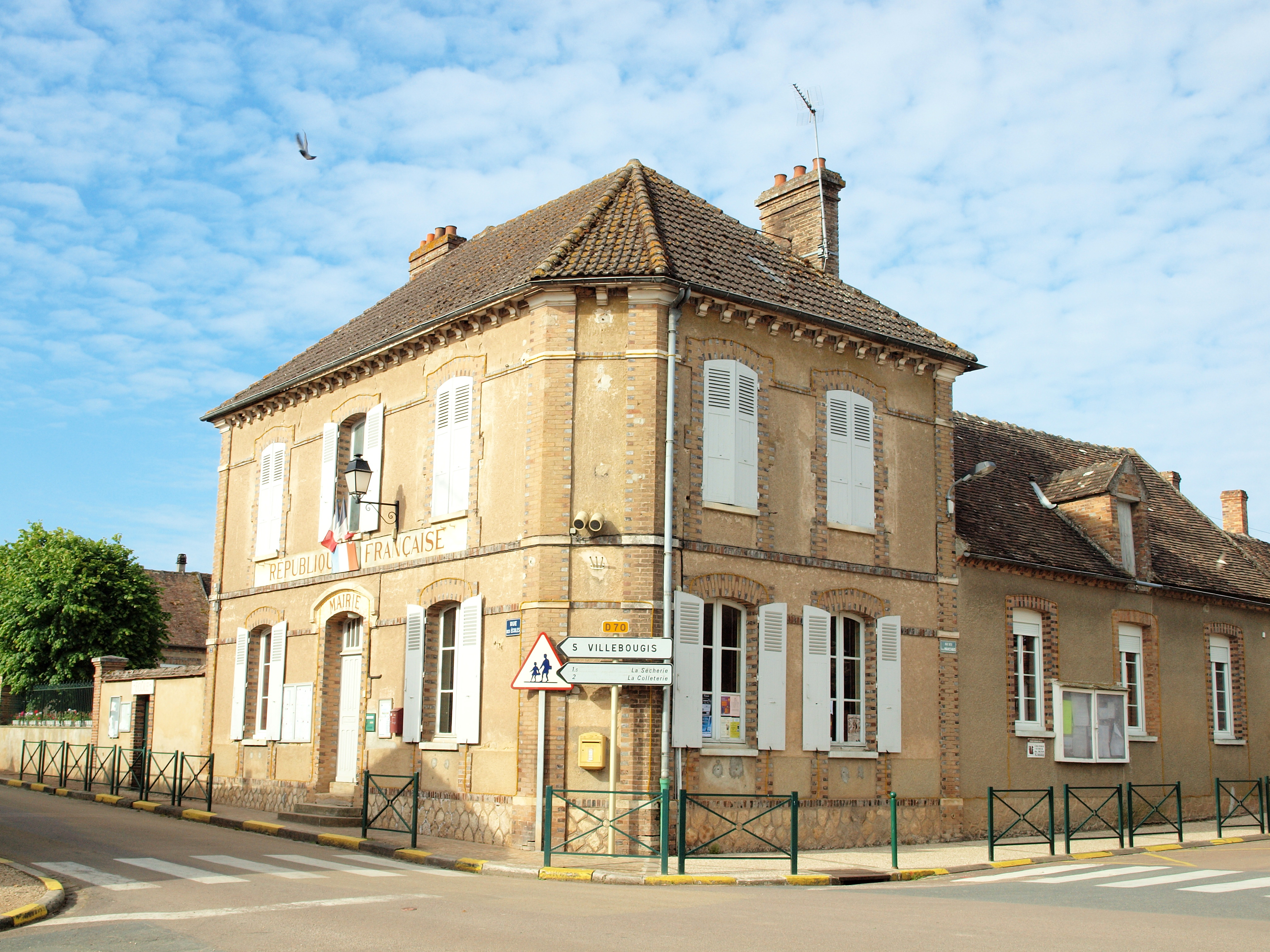 Mairie de Saint-Sérotin (Yonne, France)